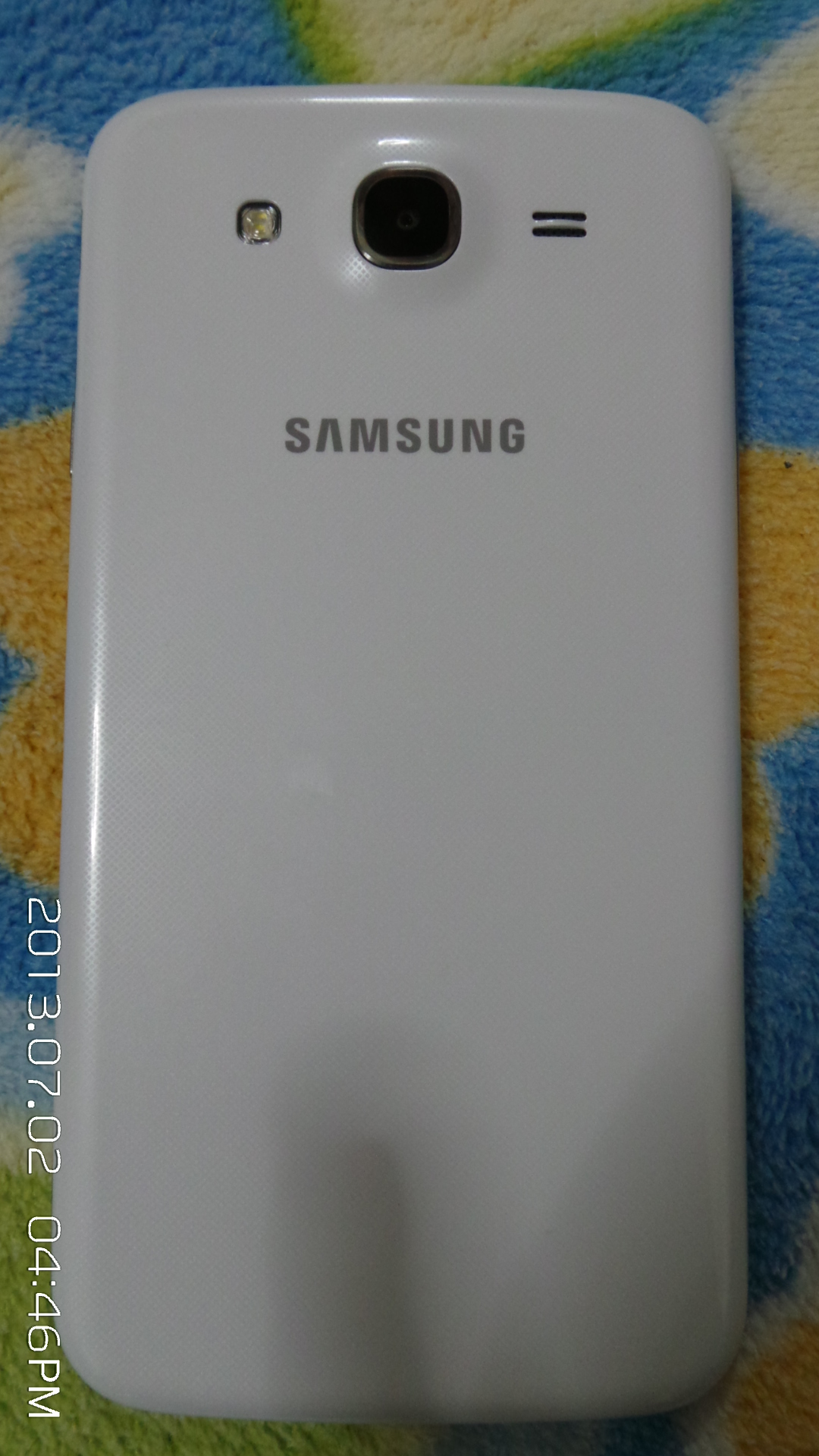 위 사진은 Samsung Galaxy Mega 5.8 후면 로서 사진을찍으신분이 위키미디어에 업로드를 원하시고 위키미디어에 파일이 공유되는것을 원하여 합의 후 올림